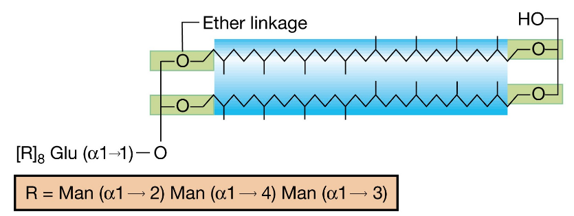 Lipopolisaccaride costituente la membrana degli archebatteri Thermoplasmata